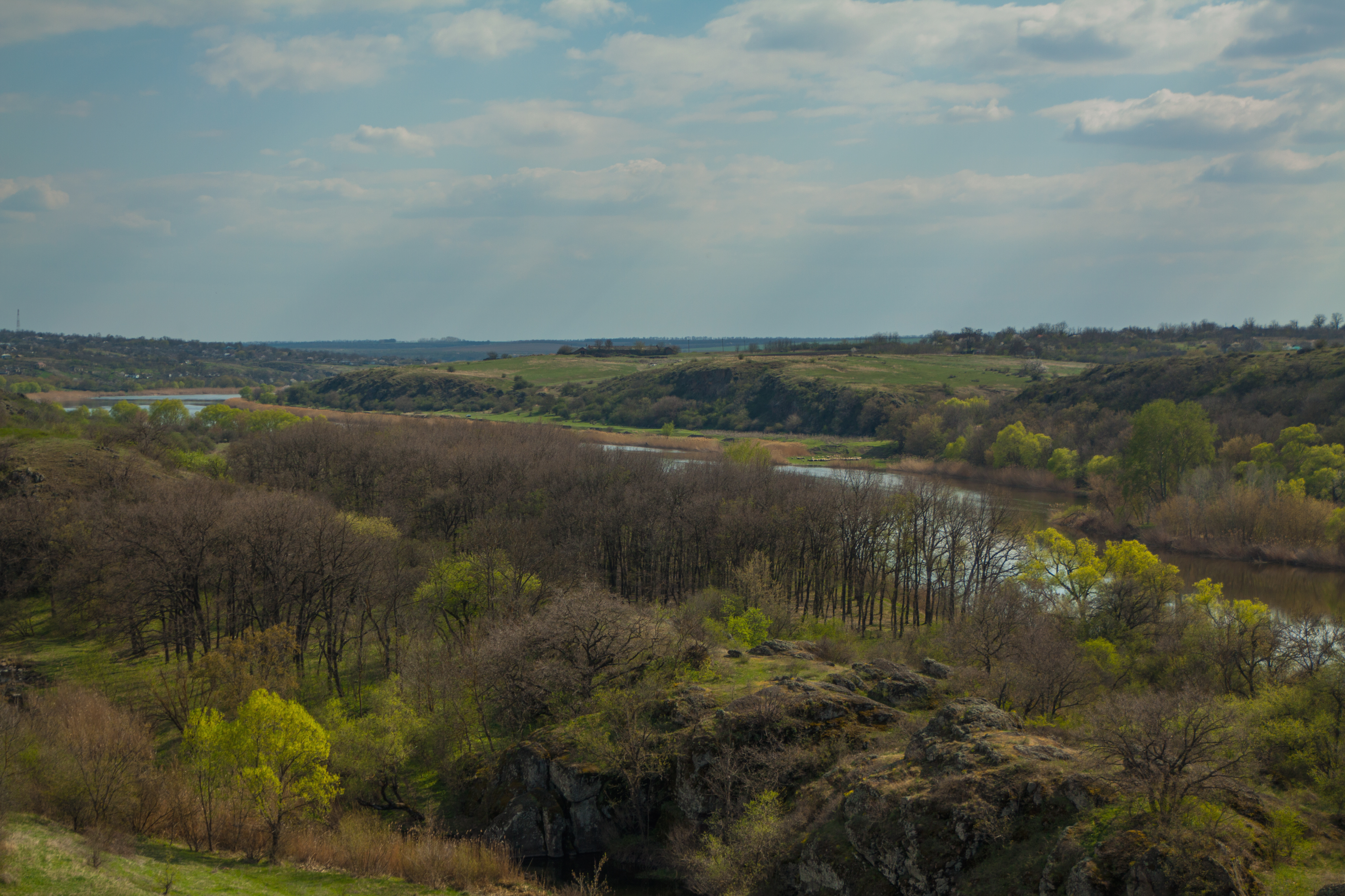 «Гранітно-степове Побужжя», Врадіївський, Кривоозерський, Первомайський, Арбузинський, Вознесенський, Доманівський, Братський р-ни